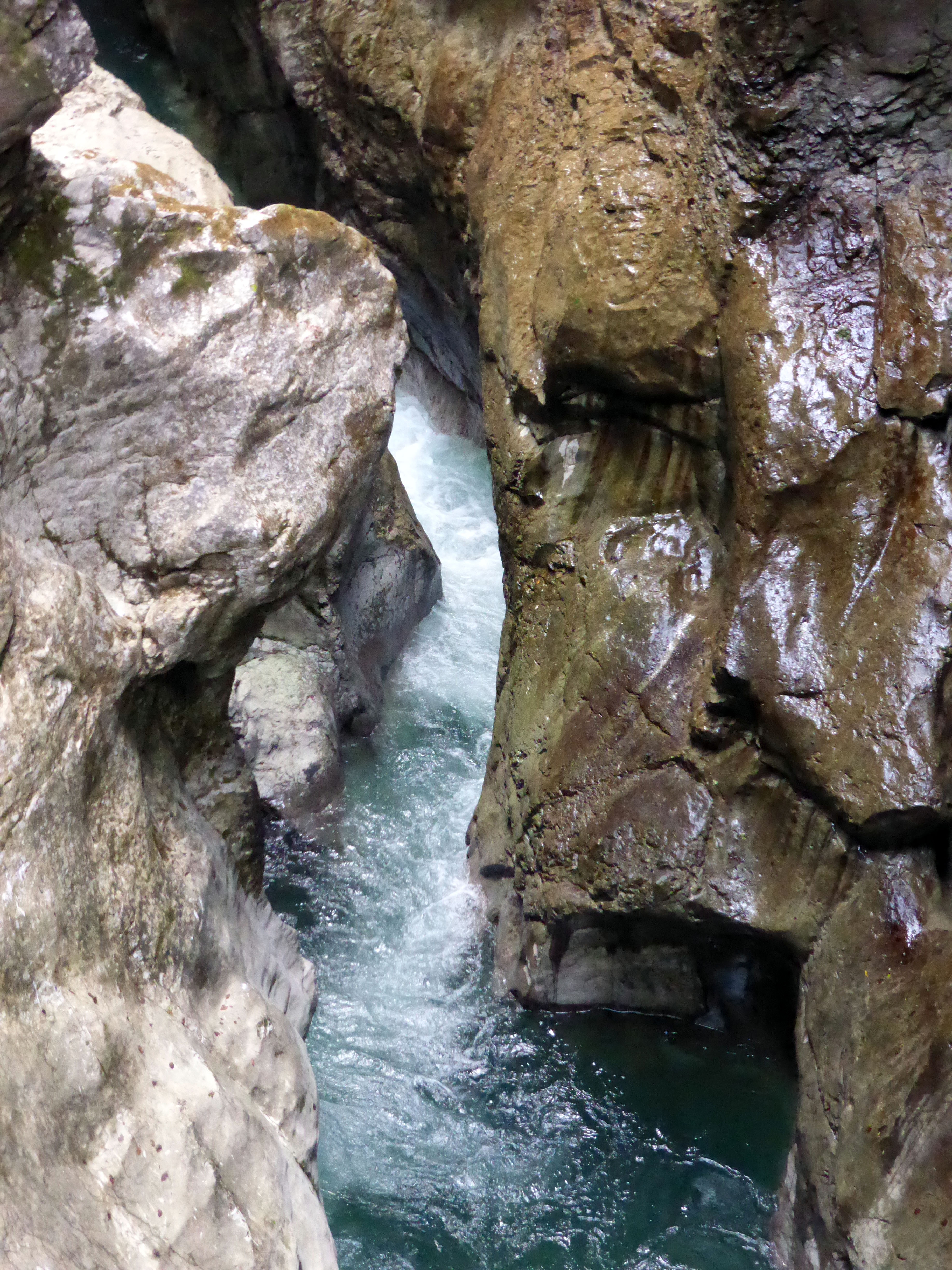 Breitachklamm bei Tiefenbach (bei Oberstdorf).